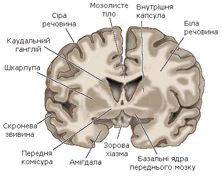 Brain-4а.jpg: Головний мозок